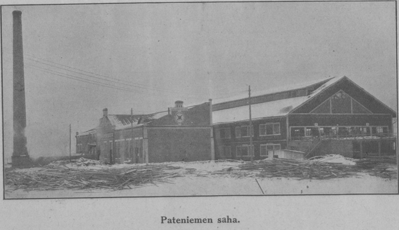 Pateniemen saha